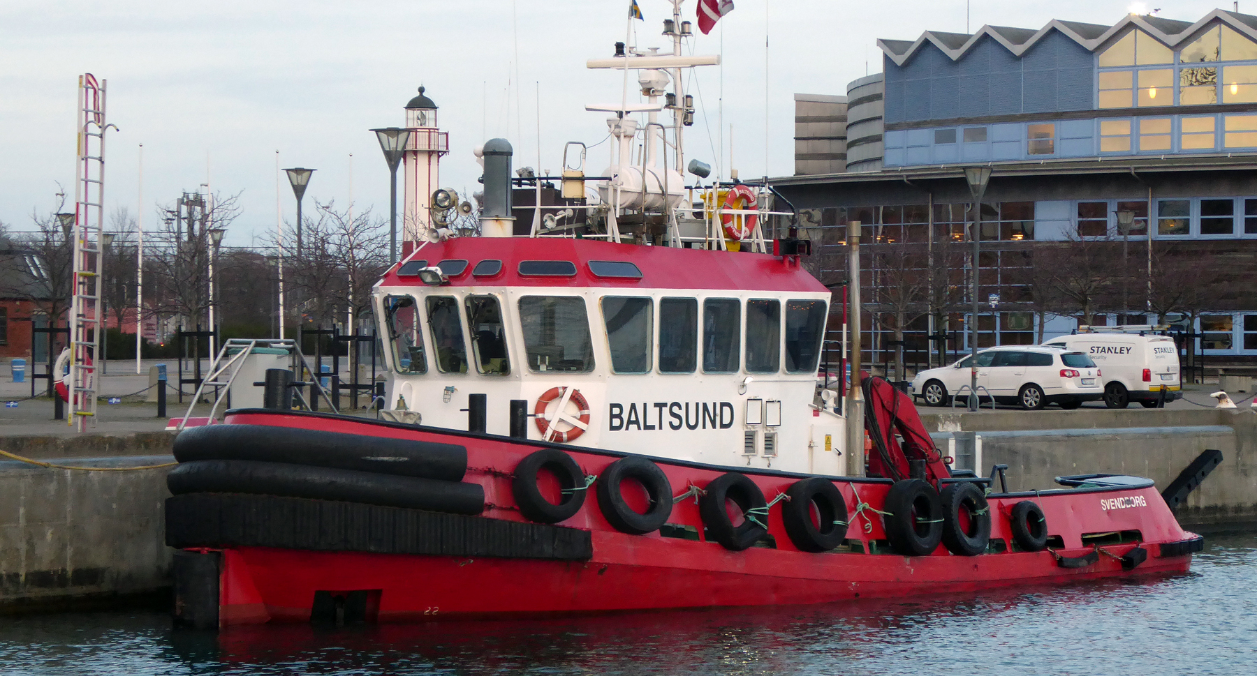 Den Danska bogserbåten Baltsund ligger i Ystads hamn 25 feb 2019.